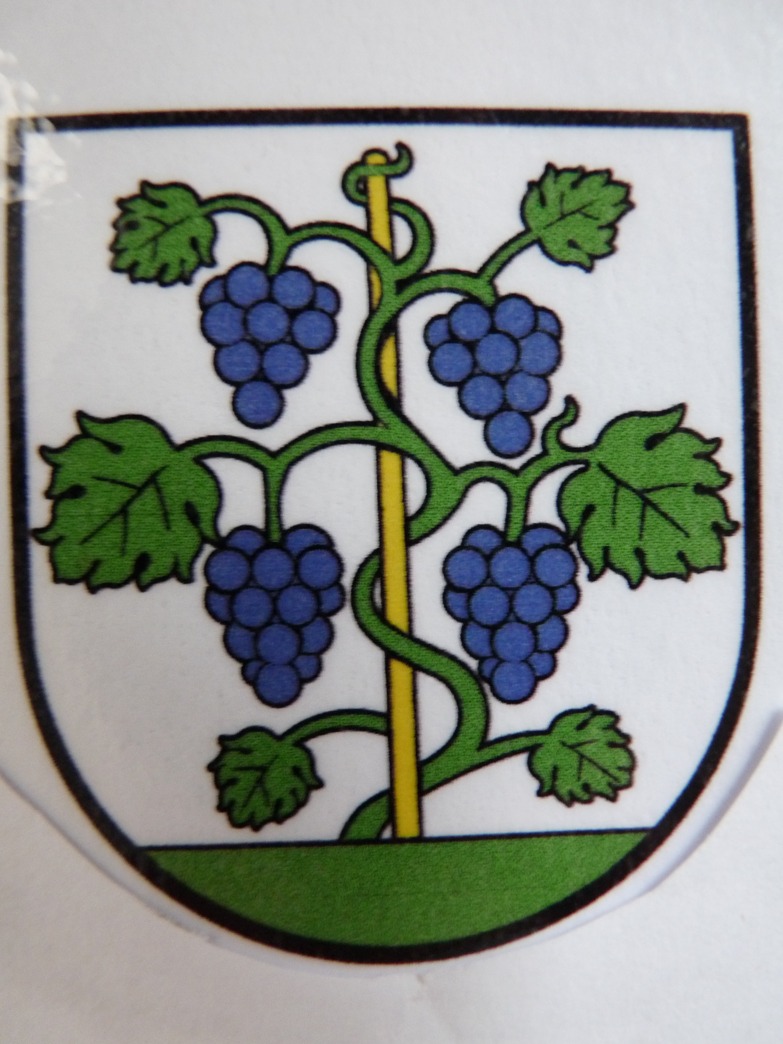 Erb obce Žibritov